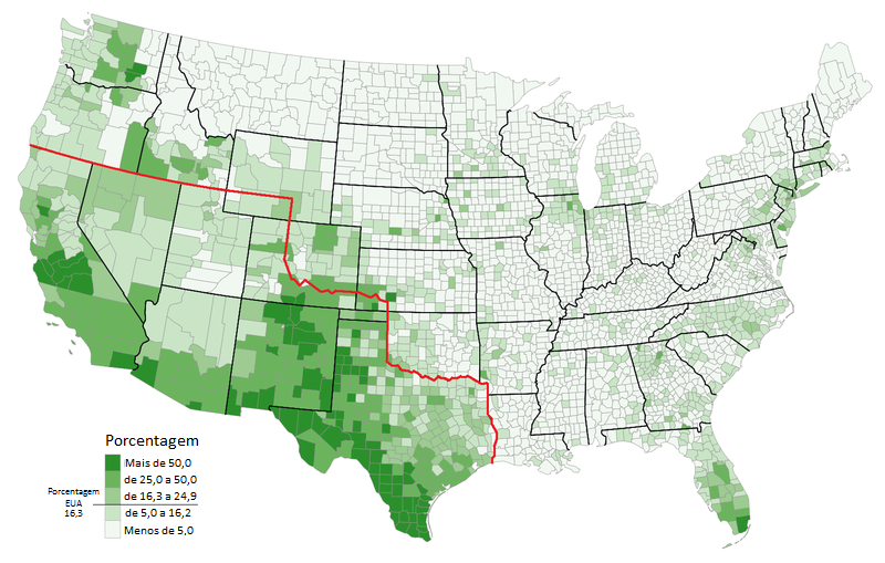 Mapa da porcentagem de hispânicos, em meio a antiga fronteira demarcada em vermelho entre Estados Unidos e México. O mapa foi desenvolvido a partir desse mapa: [1] desenvolvido a partir desses dois outros mapas:[2] [3].